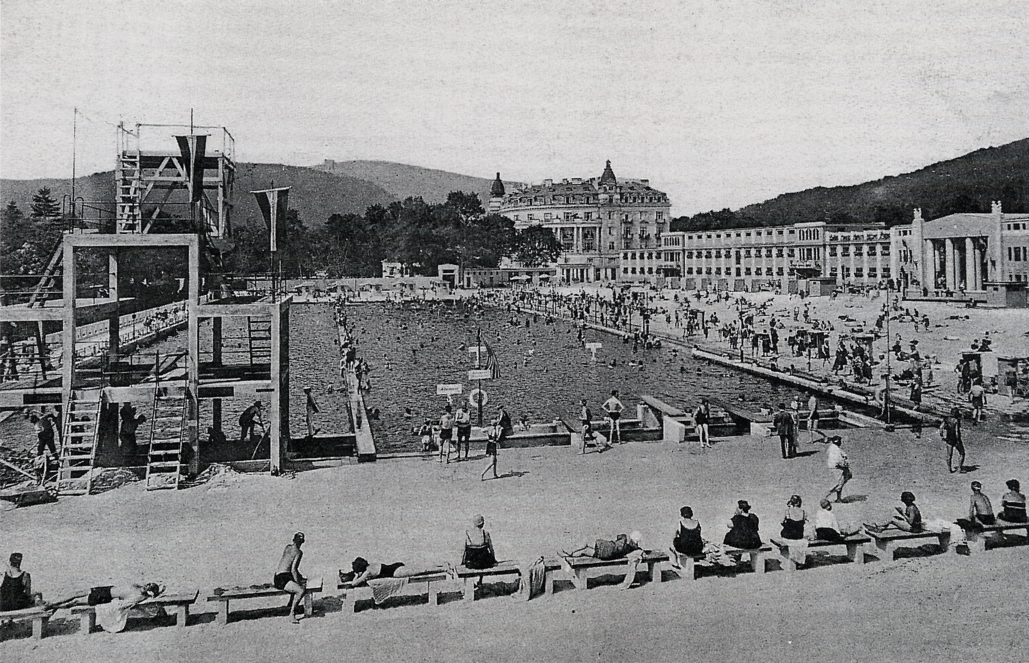 Strandbad Baden bei Wien, 1928